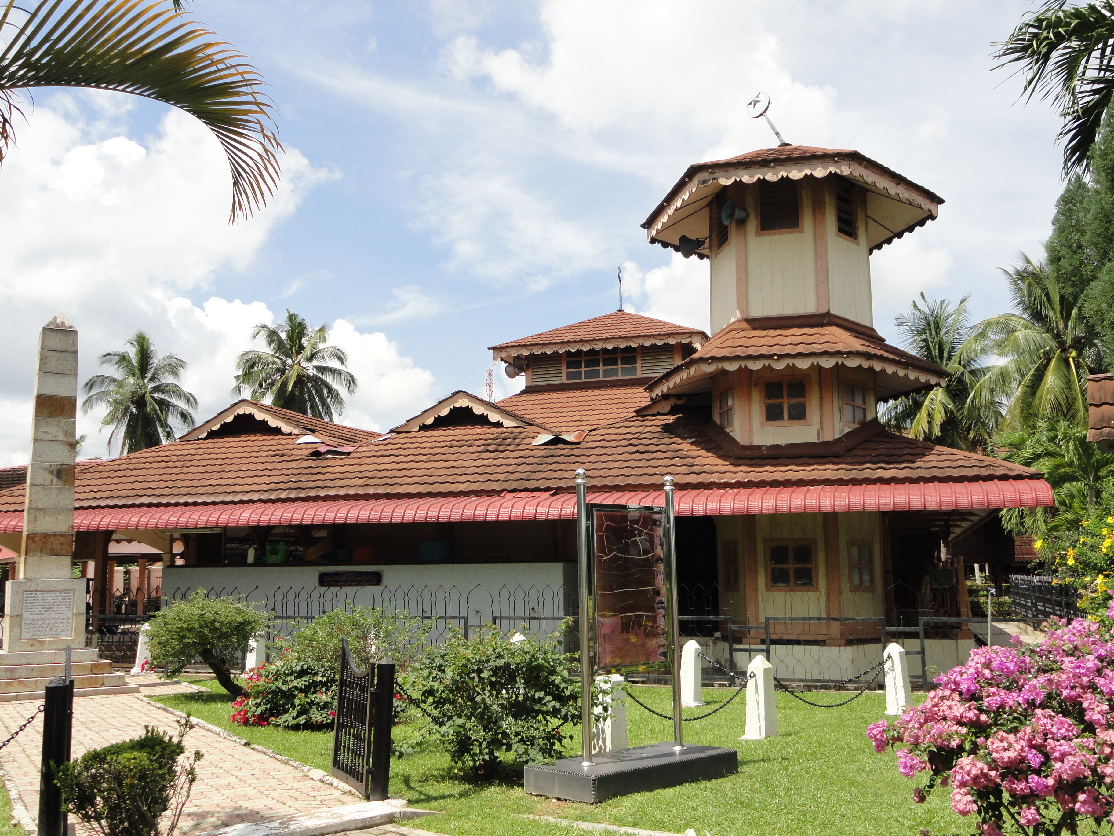 Kompleks Sejarah Pasir Salak, Perak, Malaysia